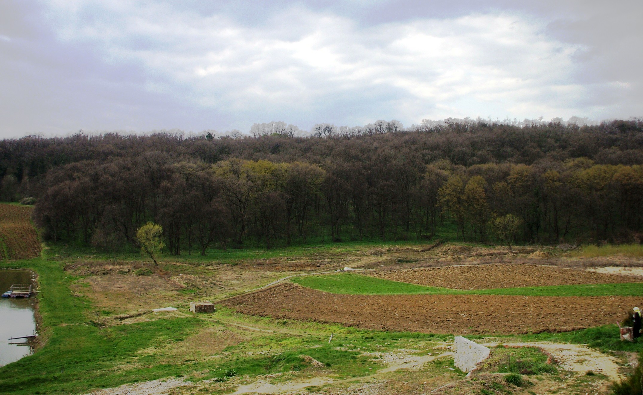 Fruška Gora Mountain, near Petkovica Monastery